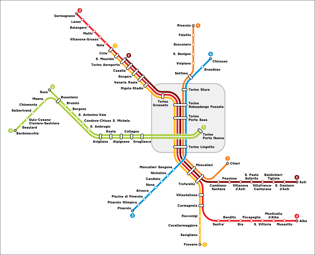 Mappa del servizio ferroviario metropolitano di Torino.